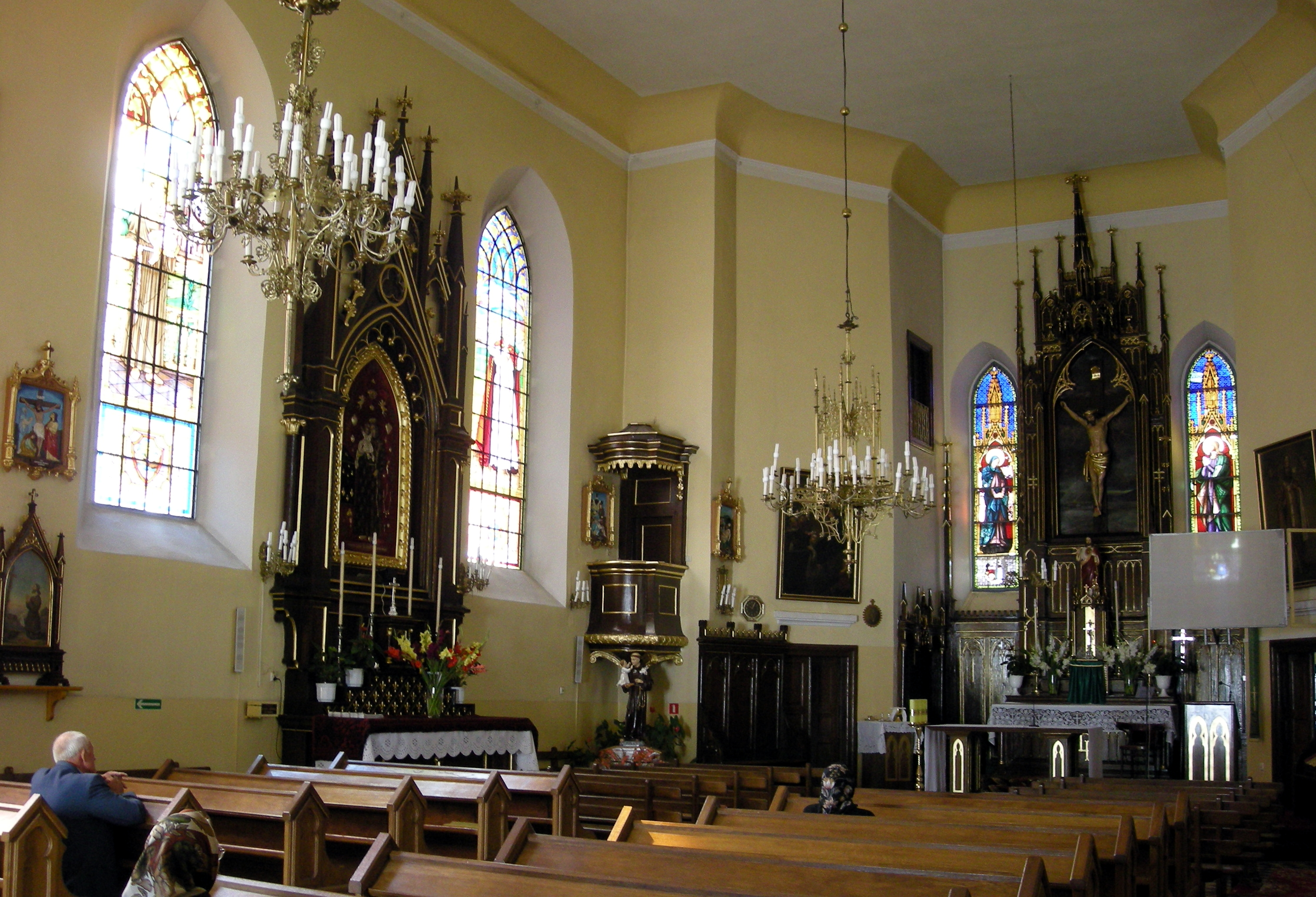 Południowa strona kościoła parafialnego w Huszlewie.